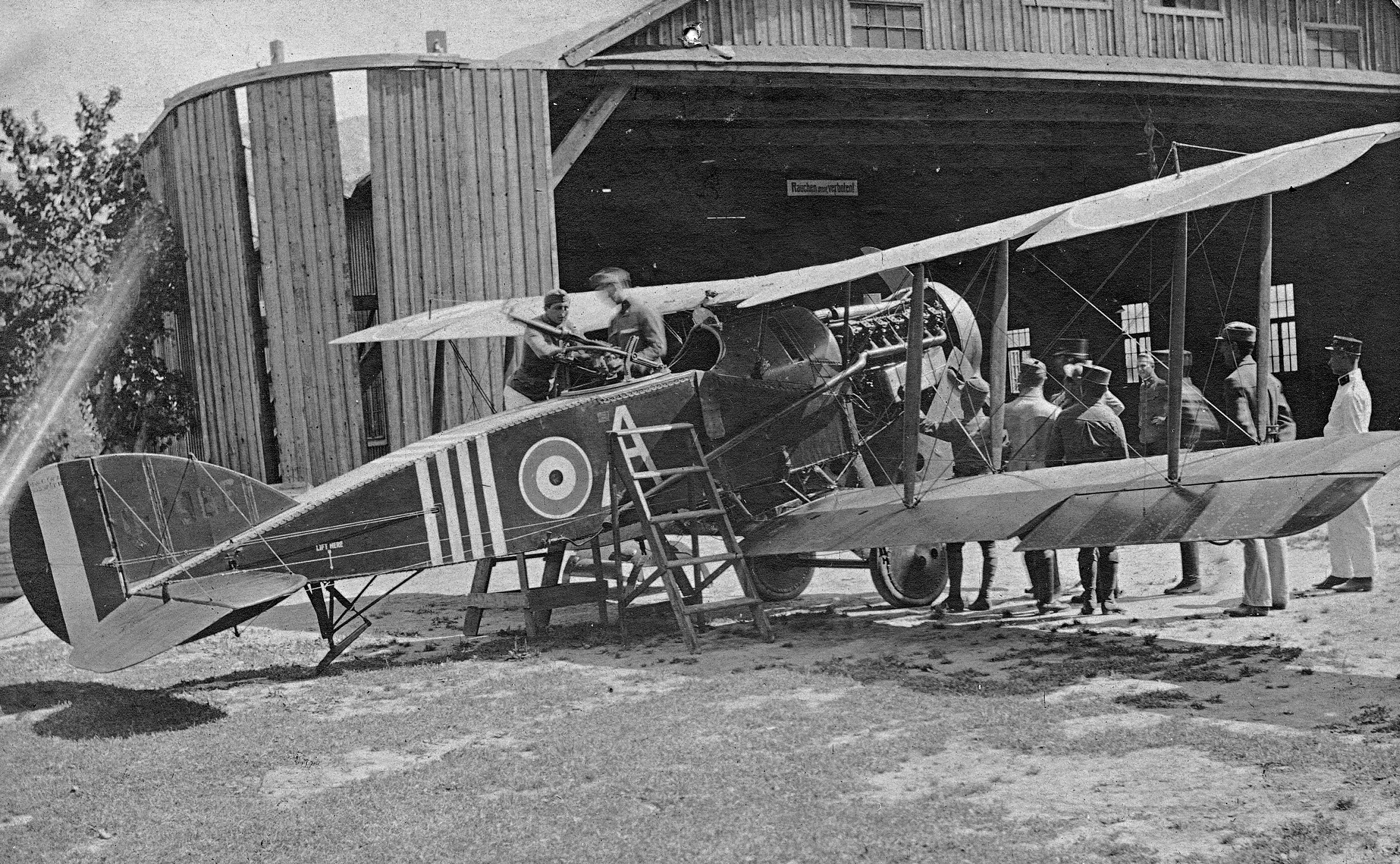 Bristol F.2B Fighter típusú repülőgép. Tags: airplane, airport, transport, military, pilot, First World War, British brand, machine gun, biplane Title: Bristol F.2B Fighter típusú repülőgép.